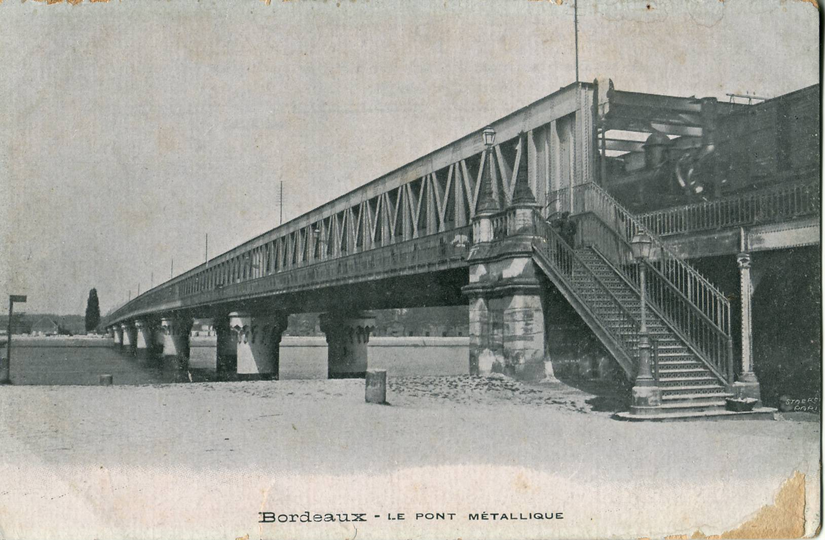 Carte postale ancienne sans mention d'éditeur :BORDEAUX - Le Pont Métallique